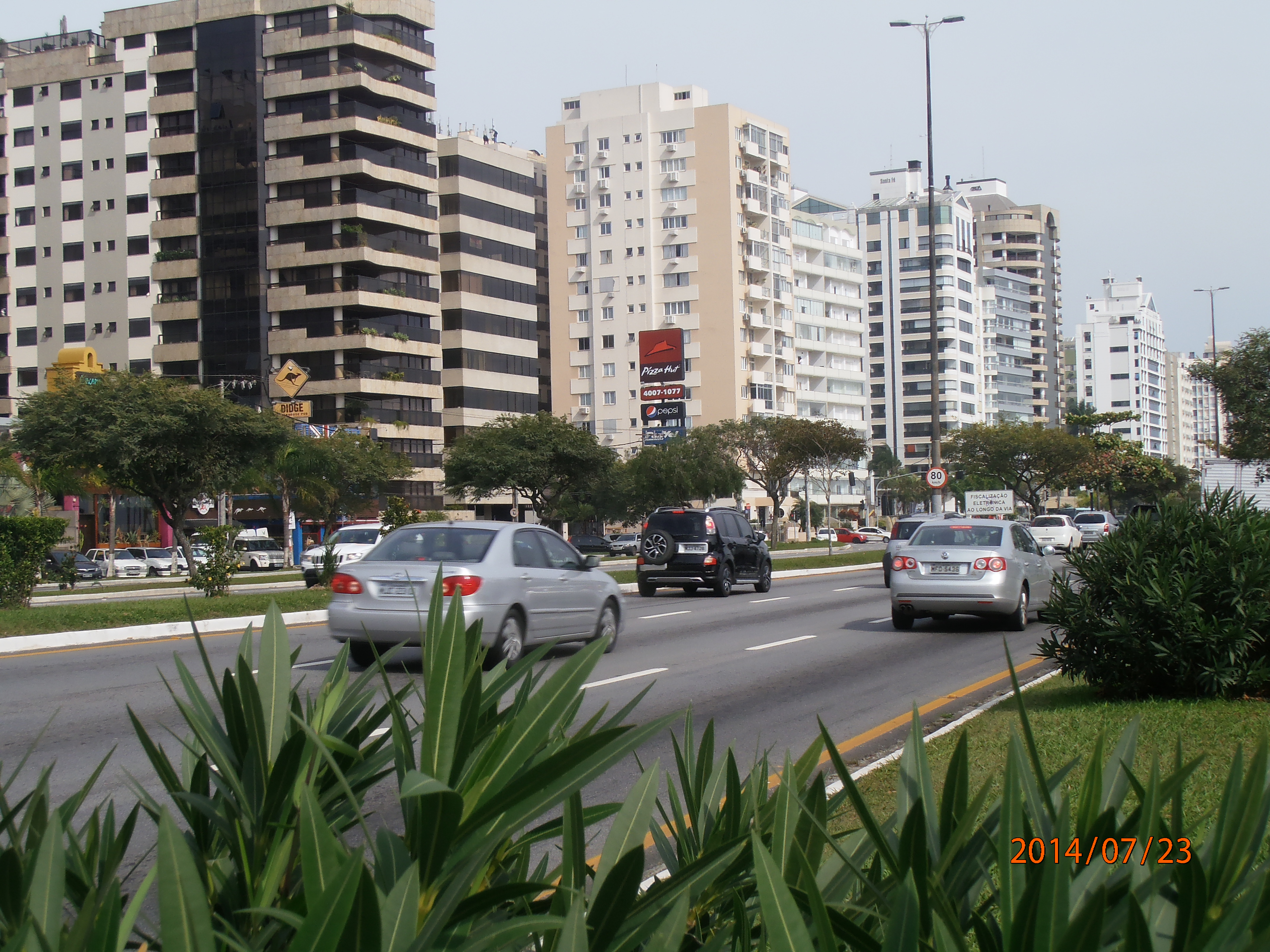 Centro, Florianópolis - SC, Brazil